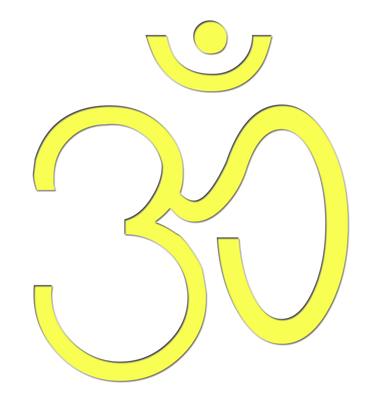 नेपाली: ॐकारको चित्र